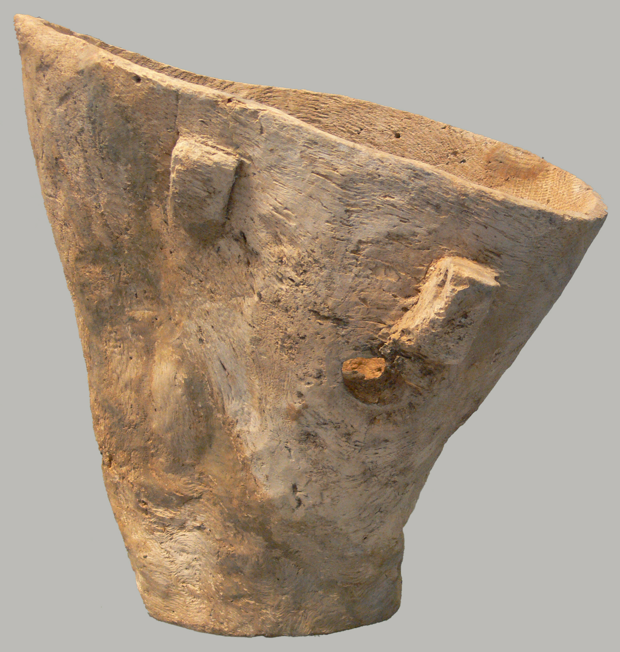 Holzeimer, etwa 3.700 v. Chr., gefunden im Schorrenried, Bad Waldsee-Reute Württembergisches Landesmuseum Stuttgart